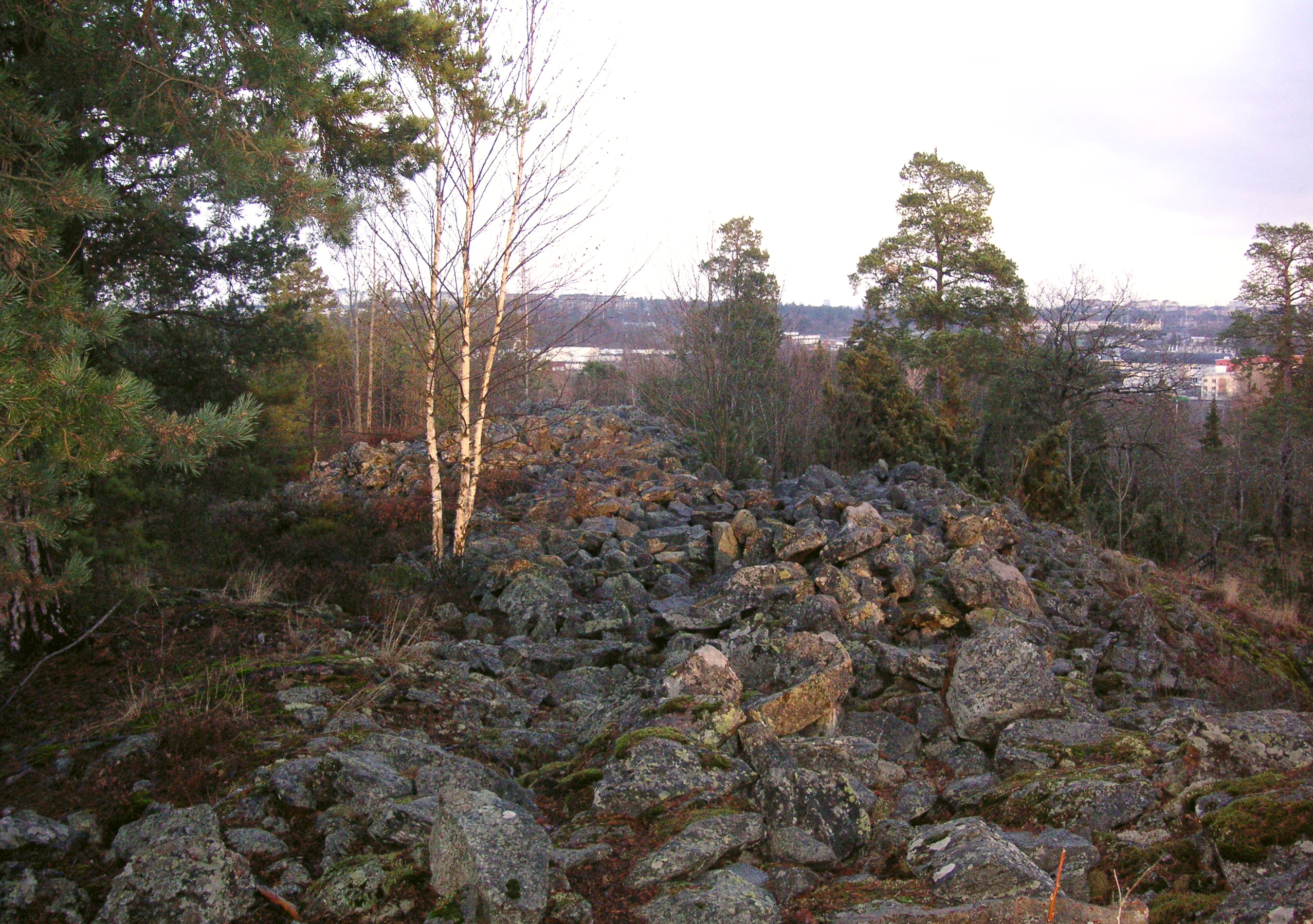 Segeltorp, Huddinge, Skansberget, fornlämning.